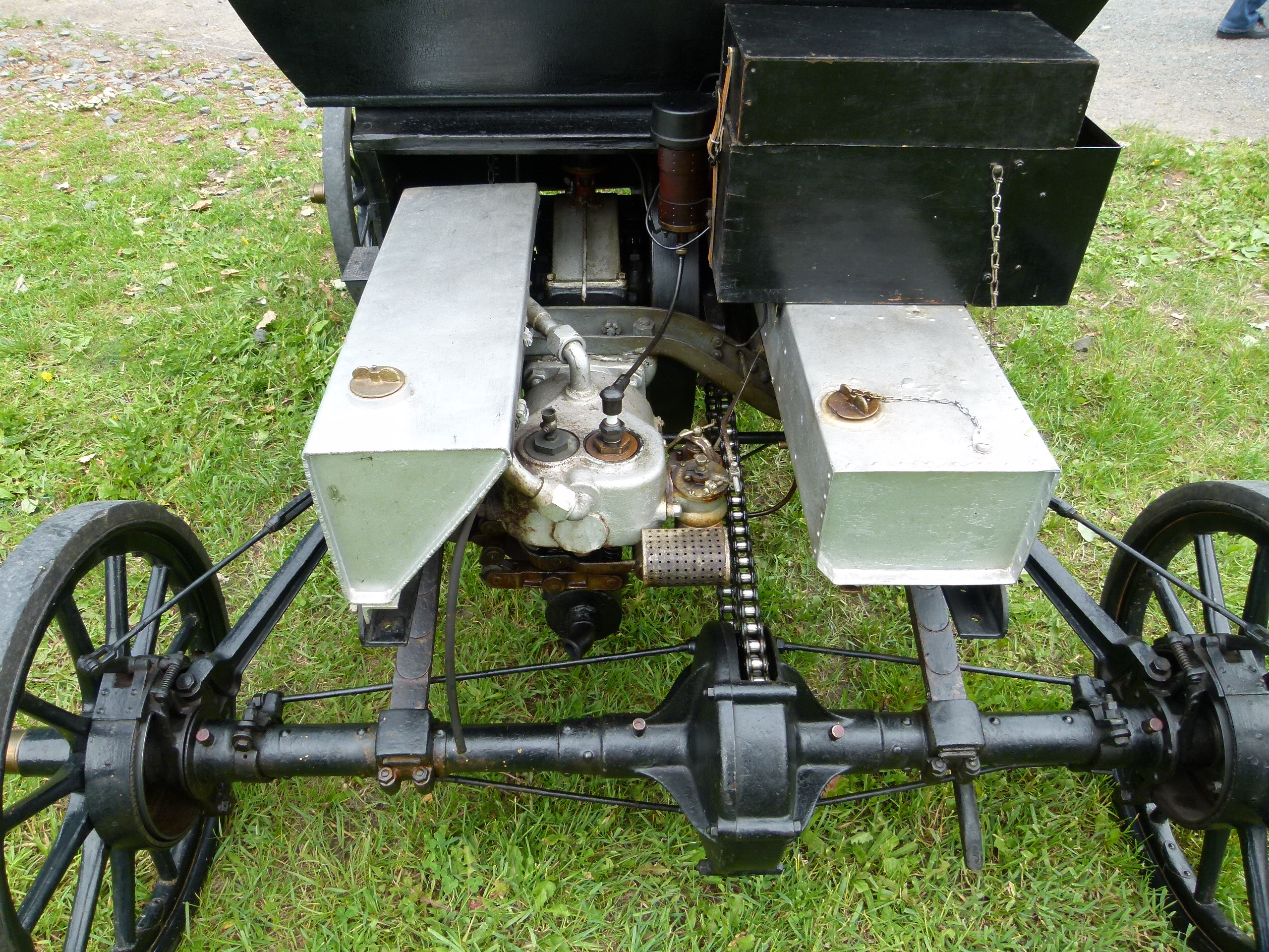 Oldsmobile Curved Dash 1903, Institut für Automobiltechnik der TU Dresden (1. TUD Campus Classics, 9.6.2012)